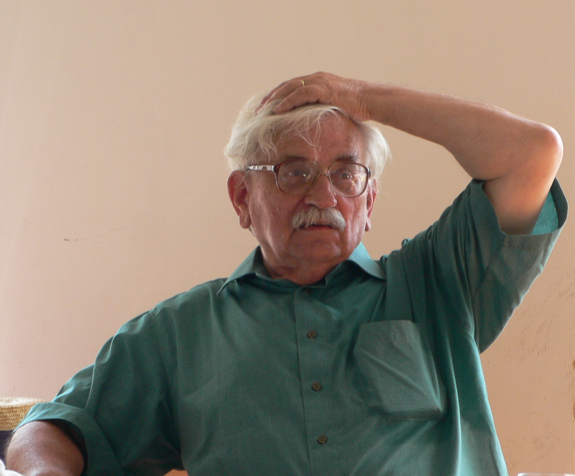 Fotografie Ludvíka Vaculíka na valné hromadě Společnosti pro Literární noviny na FAMU 26.6.2006.